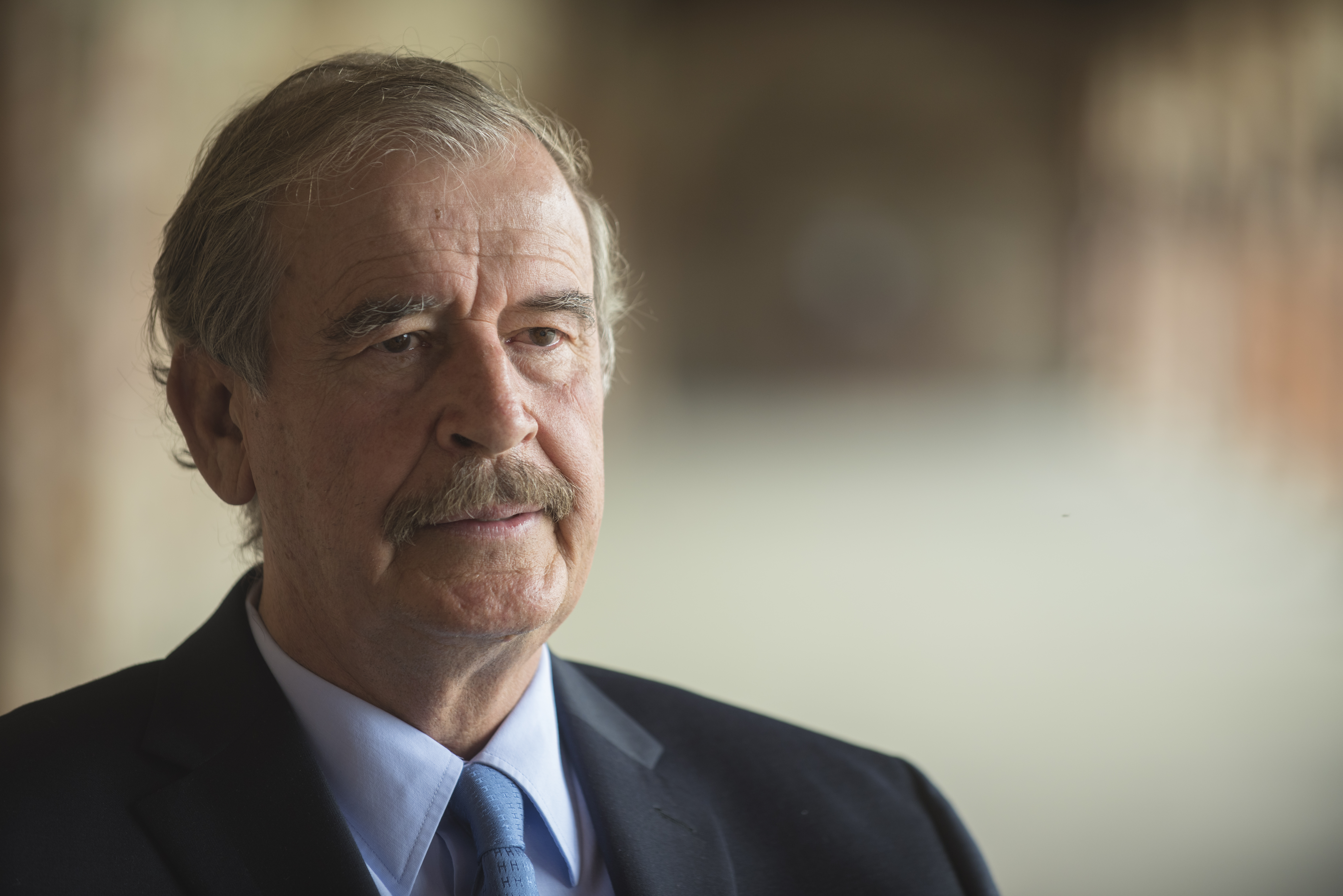 El ex presidente Vicente Fox durane una entrevista en su rancho en León, Guanajuato. Foto del 2016